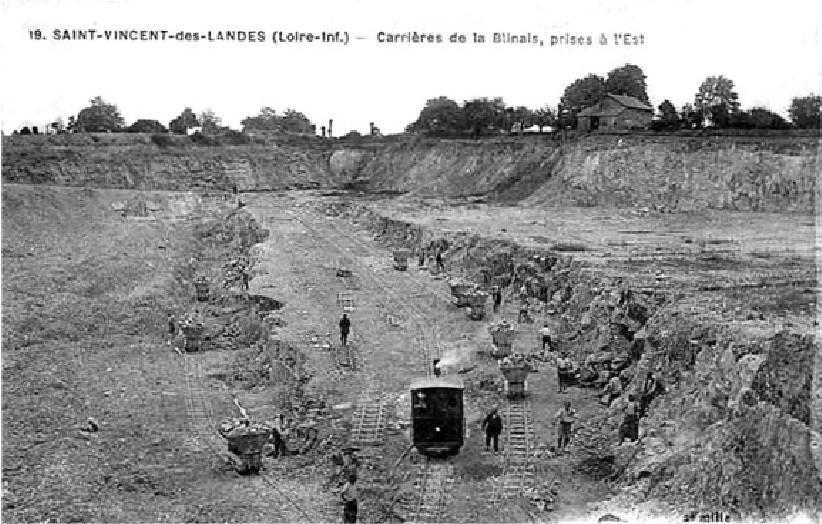 Saint-Vincent-des-Landes (Loire-Inf.) - Carrieres de la Blinais, prises d l'Est